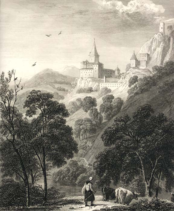 Chateau near Collman, at the entrance of Grednerthal. London Published April 1, 1819 by John Murray, Albemarle Street, and W.B. Cooke, 13, Judd PlaceEast, New Road.Drawn by P. Dewint, from a sketch by Major Cockburn.Engraed by B.W. Cooke.